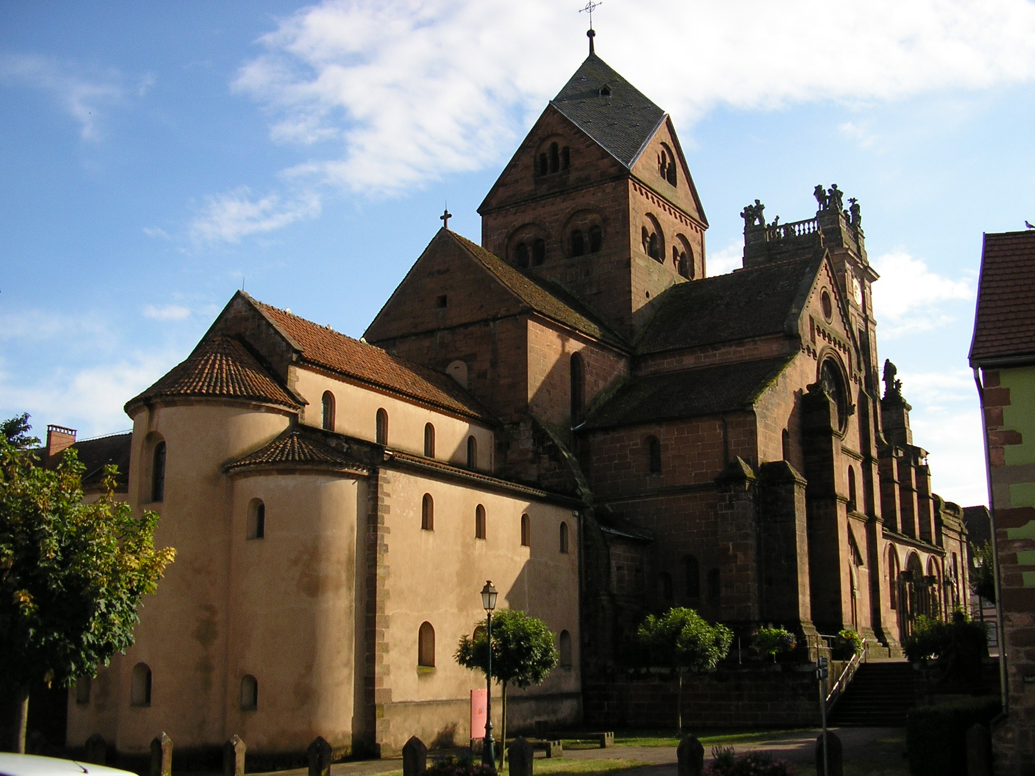 abbatiale st pierre st paul neuwiller (67)